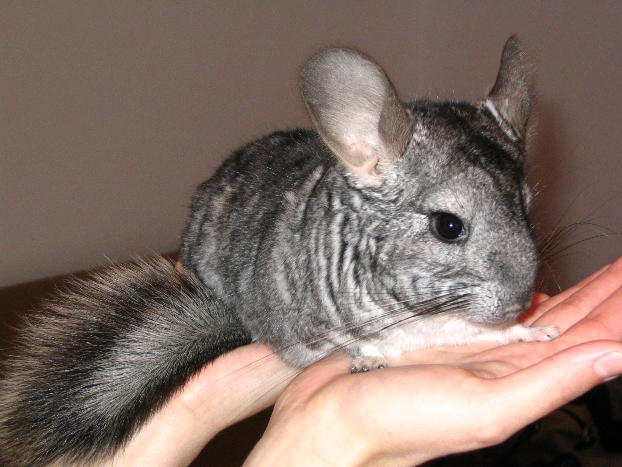 Zdjęcie szynszyli